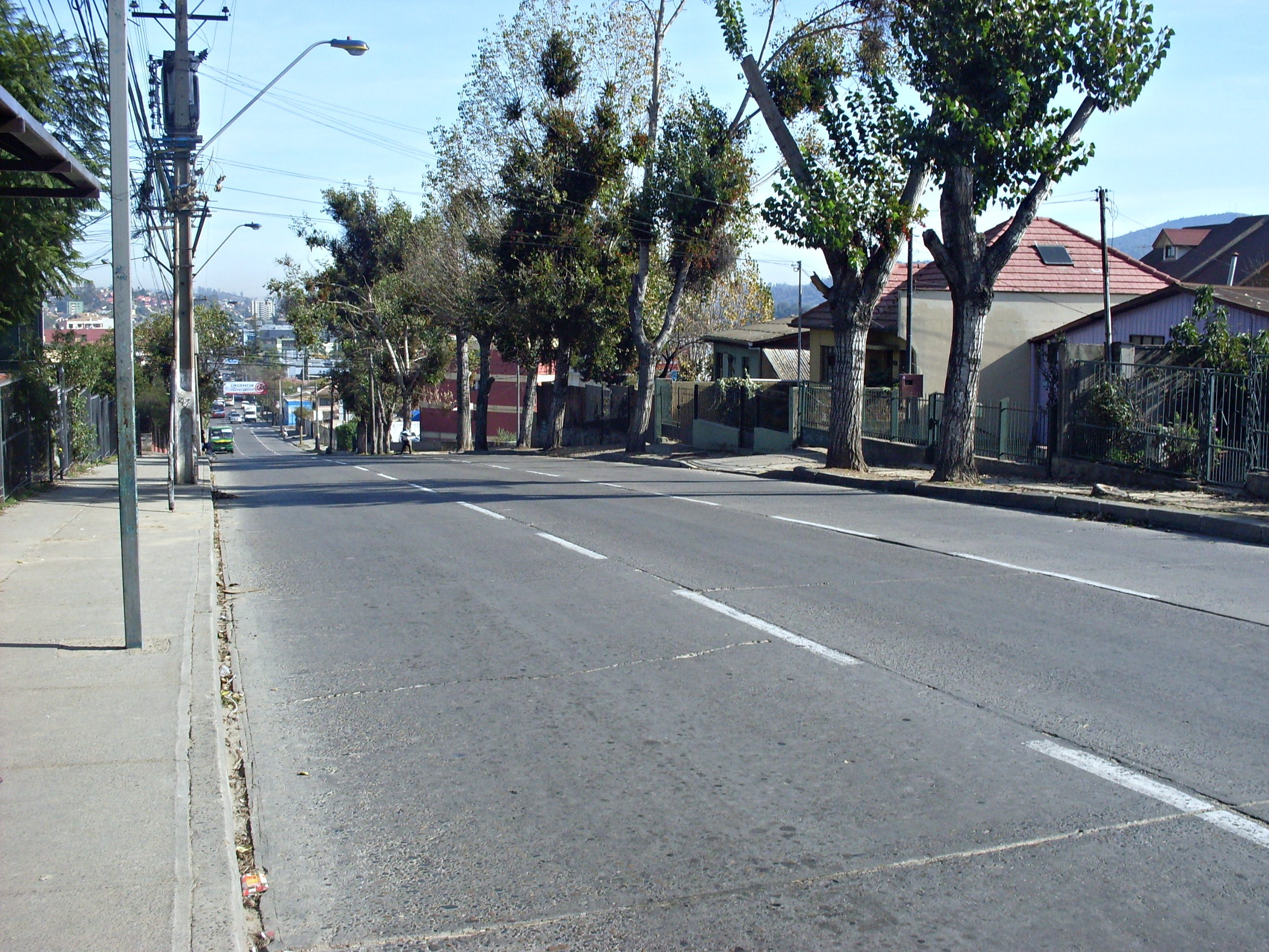 Avenida Los Carrera, la principal vía de la ciudad de Quilpué. En la imagen, dicha avenida a la altura de la intersección con calle San Martín.